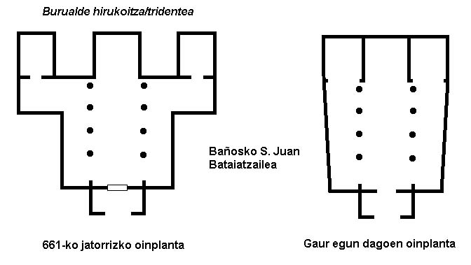 Bañosko San Juan